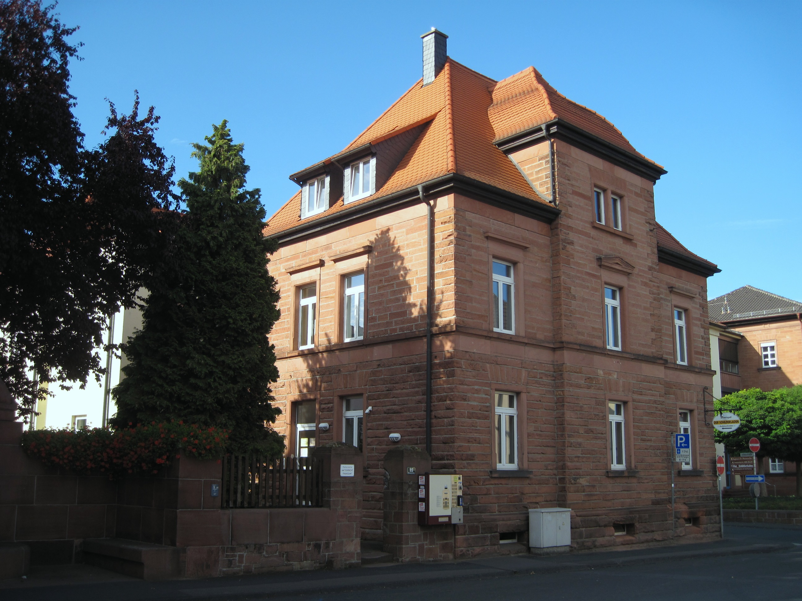 Amtsgericht Obernburg, Nebenstelle Römerstraße 89 in Obernburg am Main.